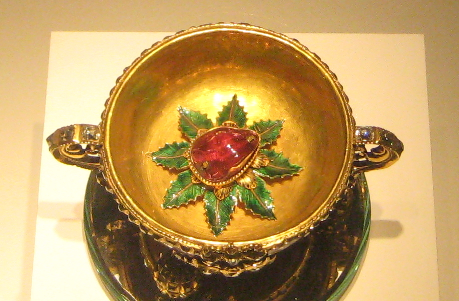 Чарка. 1709. Золото, бриллианты, алмазы, эмаль, рубиновая шпинель, ореховый кап, чеканка. Выточена собственноручно Петром I и подарена им Матвею Петровичу Гагарину, московскому губернатору, который заказал для нее оправу.